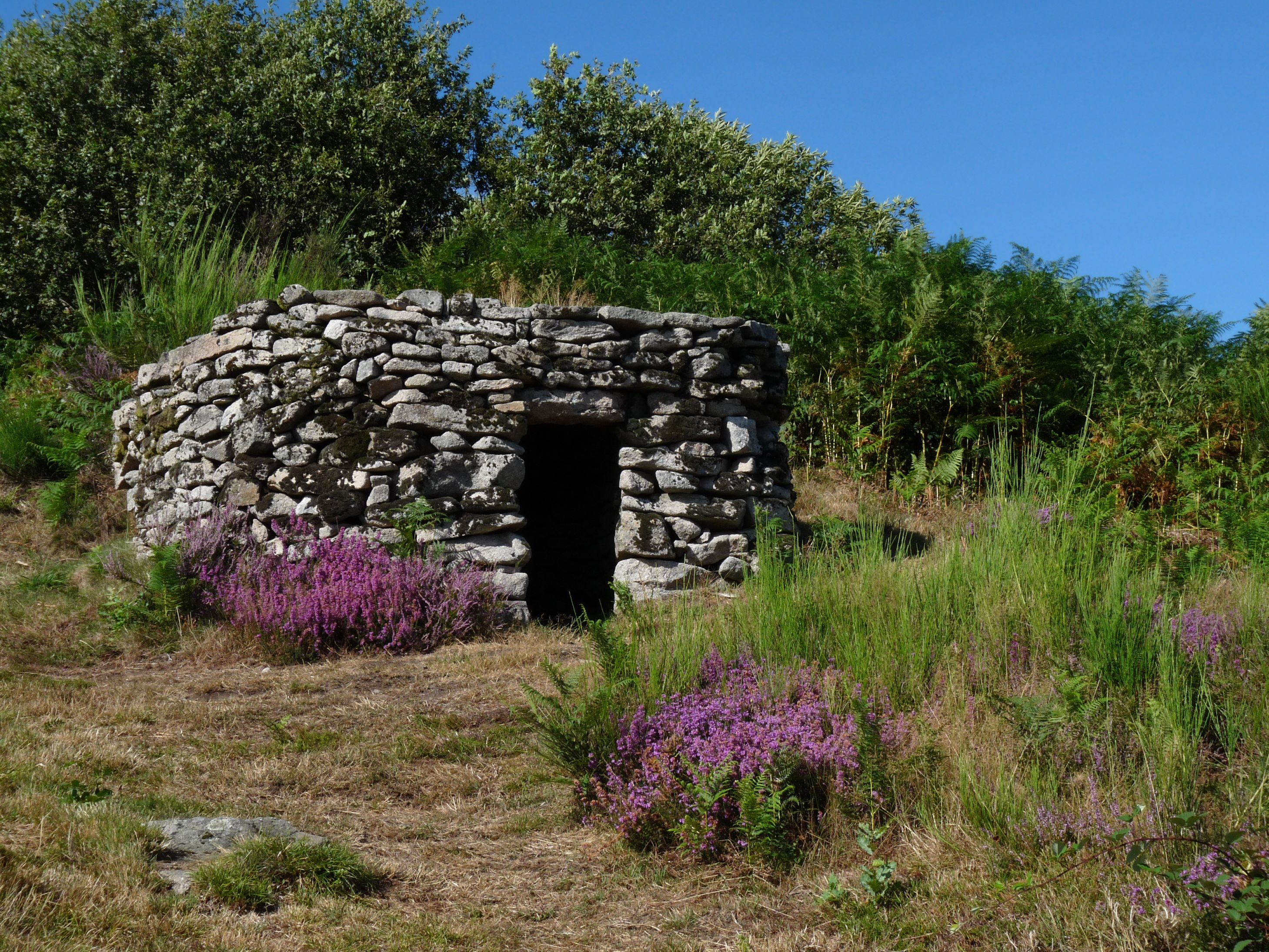 Loge de berger, près de Saint-Goussaud dans le département de la Creuse.